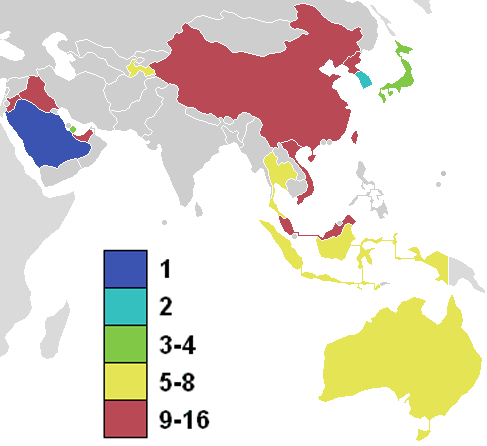 Распределение мест Кубка Азии U19 2018